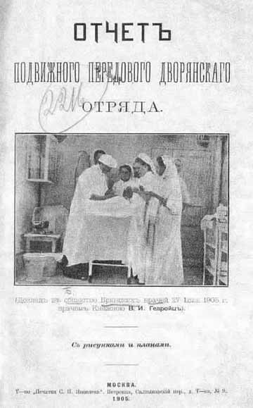 ОТЧЕТ ПОДВИЖНОГО ДВОРЯНСКОГО ОТРЯДА